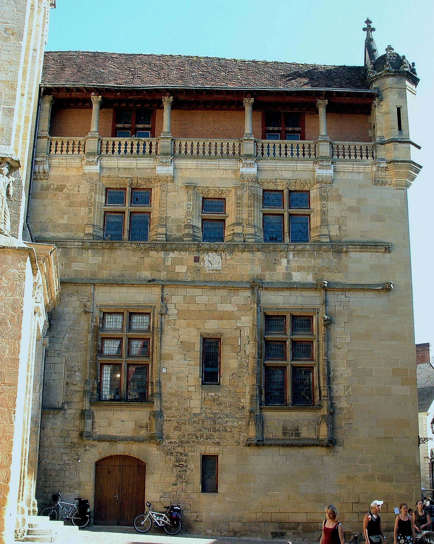 Sarlat-la-Canéda - Ancien palais épiscopal